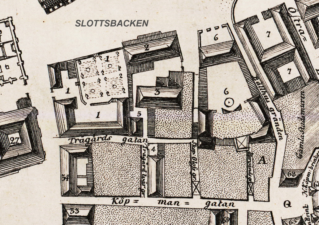 Kvarteret Europa: Detalj av Jonas Brolins karta över Staden mellan broarna 1771. I kvarteret Europa: nr 1 Indebetouska fastigheten och trädgården; nr 2. Stora Bollhuset; nr 3. Finska kyrkan (Lilla Bollhuset); nr 5 Finska församlingens komministerboställe (tomt nr. 4); nr. 6 Tessinska palatset